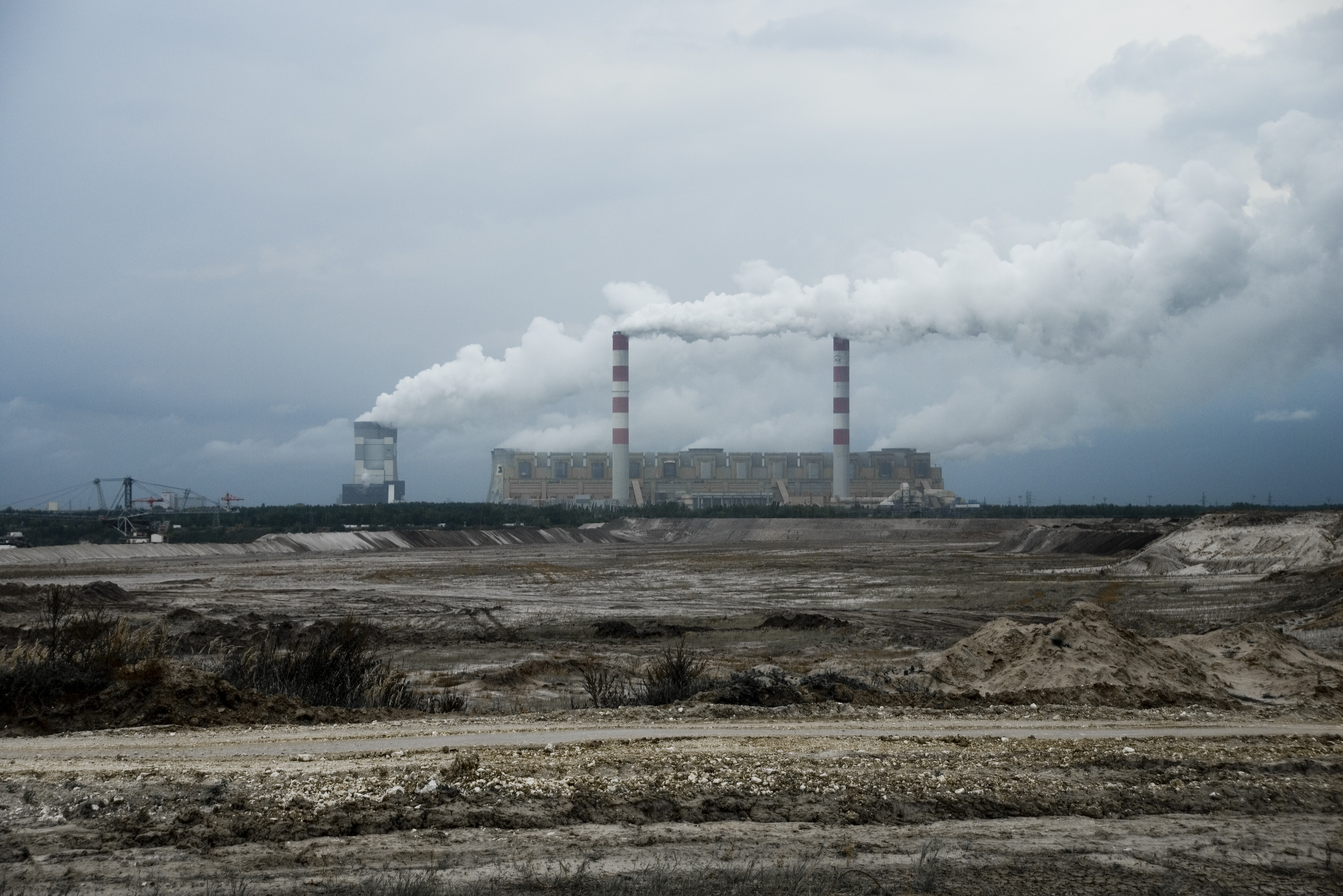 Kopalnia węgla brunatnego i elektrownia Bełchatów